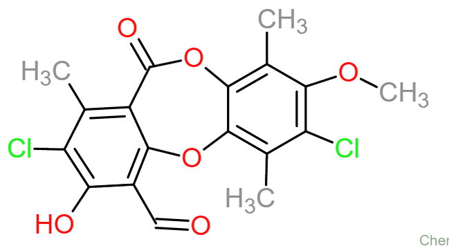 Efnabygging argopsins